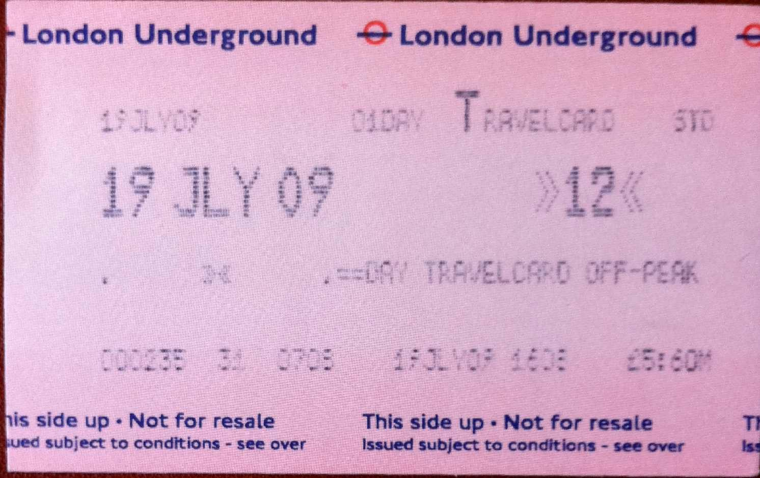 Ticket do Metro de Londres